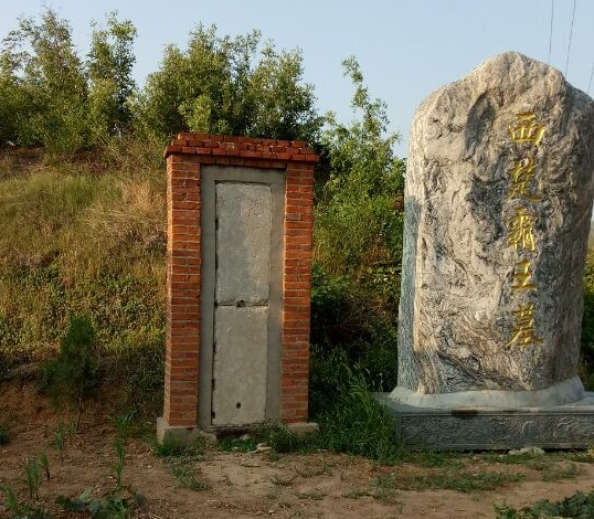 位于旧县境内的西楚霸王墓